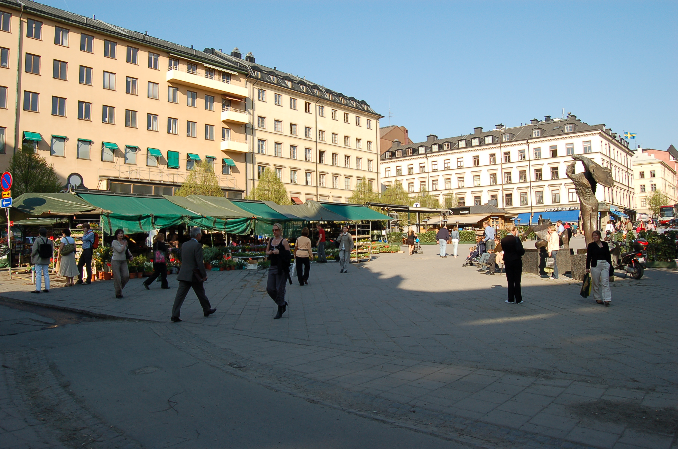 Östermalmstorg i Stockholm mot nordost från Nybrogatan.